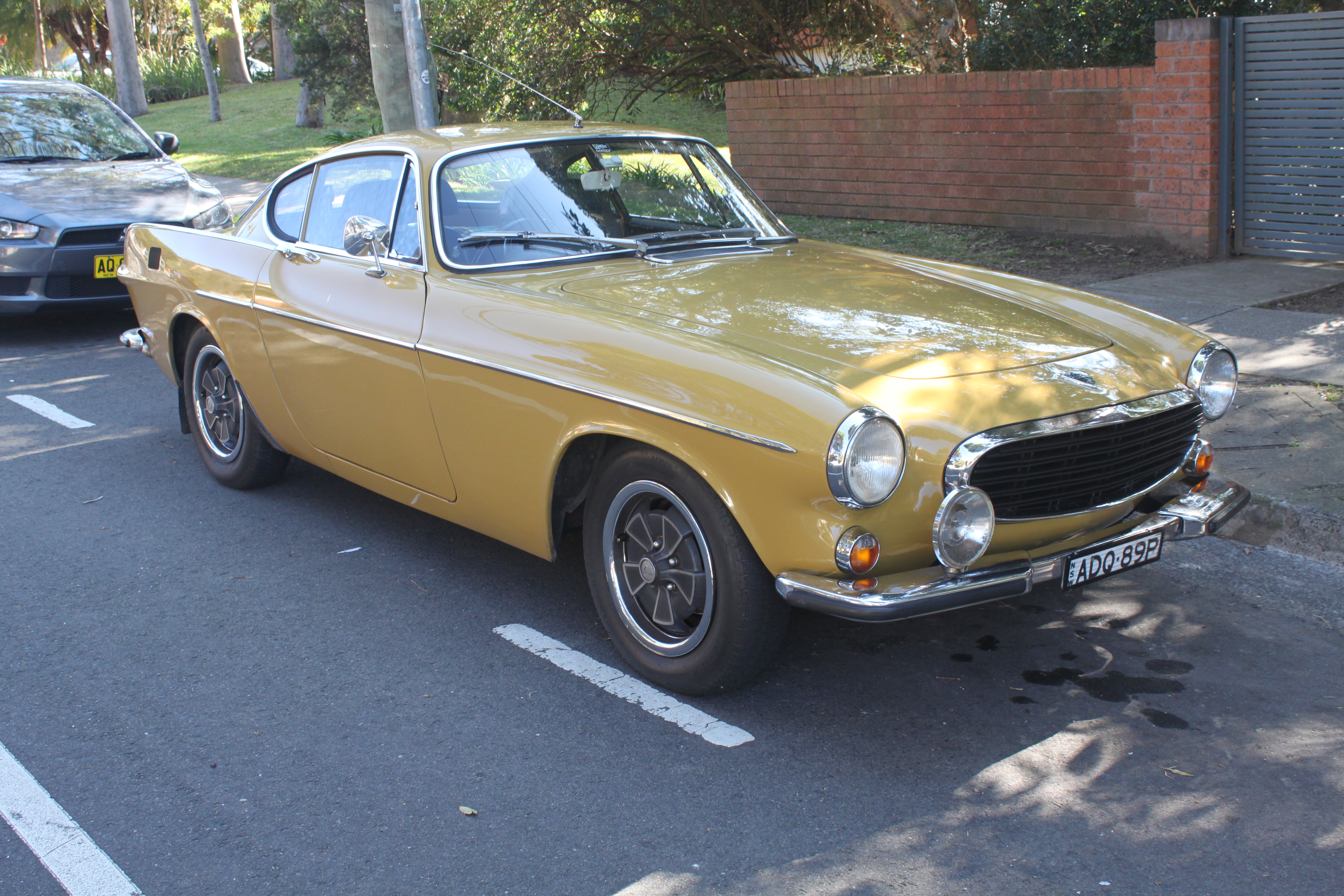 Volvo P1800 E